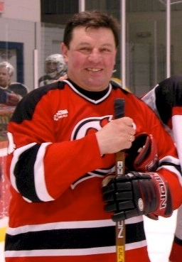 Roger J. Muller, Jr. & his Buddy Sergey Starikov 2005